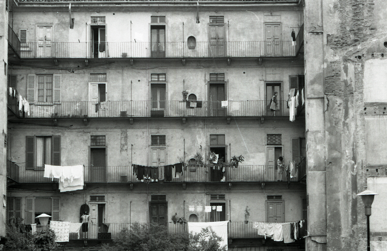 Serie fotografica : Milano, 1970 / Paolo Monti. - Strisce: 5, Fotogrammi complessivi: 26 : Negativo b/n, gelatina bromuro d'argento/ pellicola ; 35 mm. - ((I fotogrammi hanno una doppia numerazione. . - Sul portanegativi: Nikon B Agfa 21. - Sul dorso del portanegativi Monti specifica: "Corso Garibaldi. Manifesti, case, finestre, cortili, ecc".